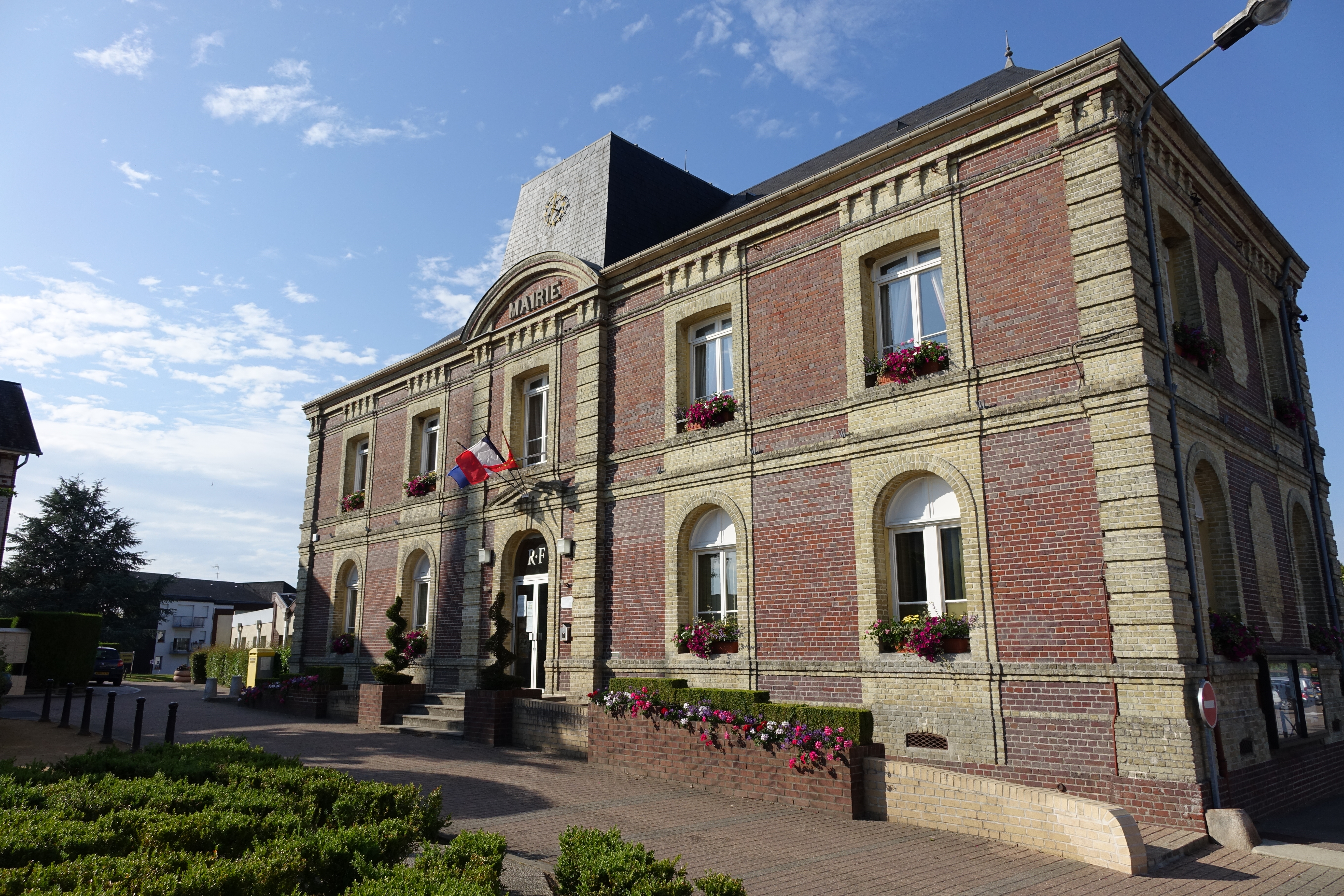 Mairie de Quincampoix, Seine-Maritime, France